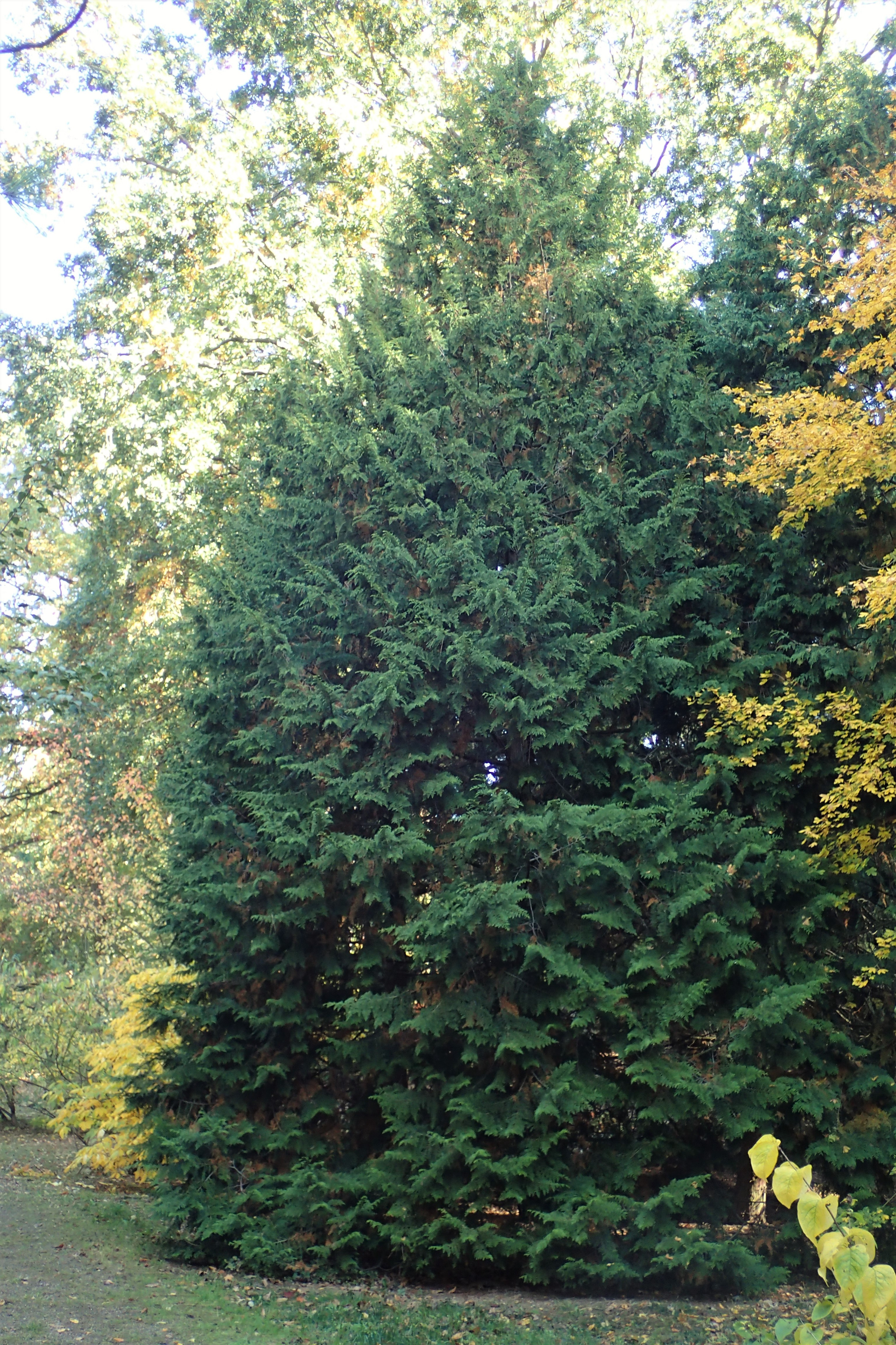 Chamaecyparis obtusa in arboretum in Glinna